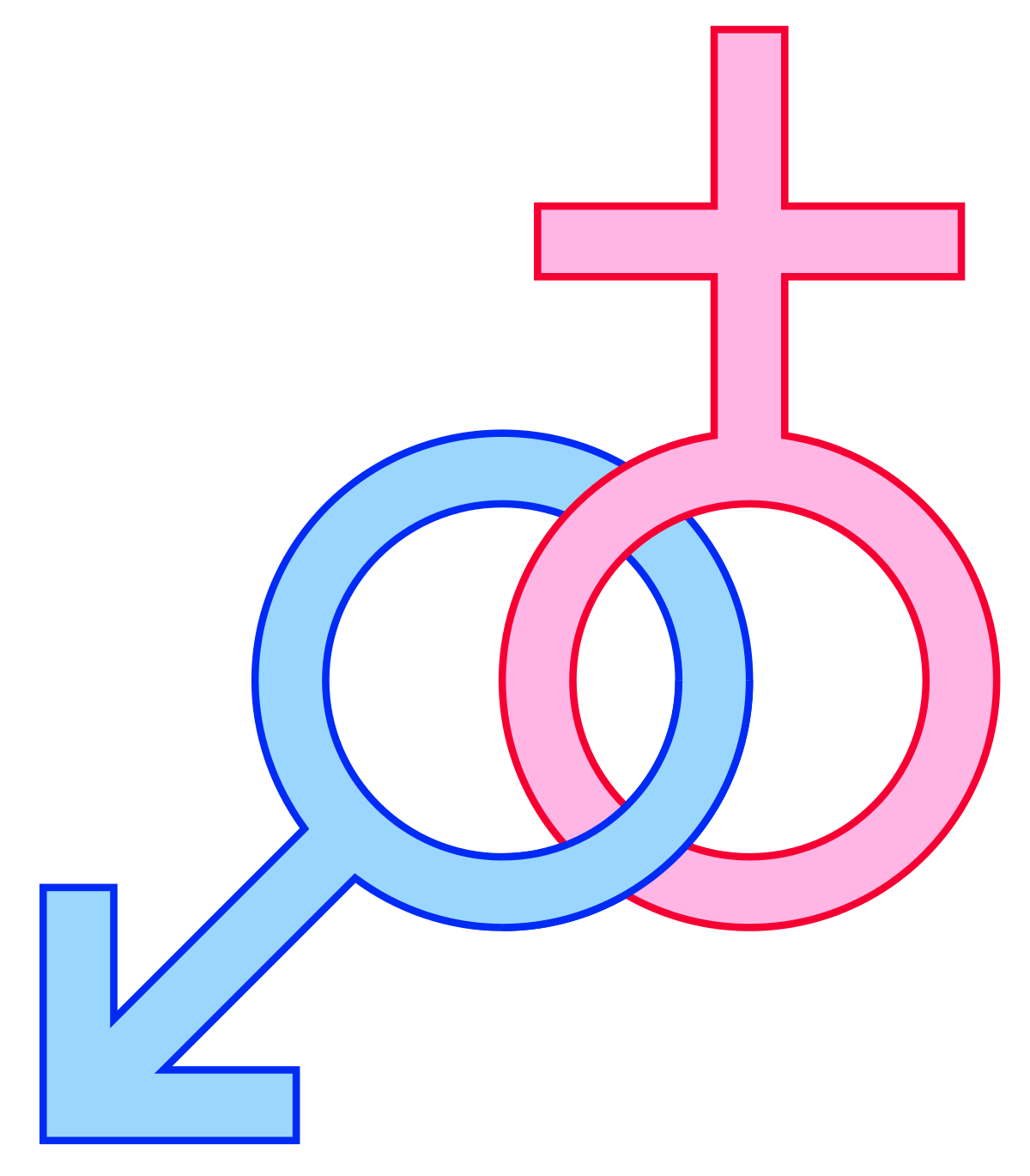 Heterosexualidad Queer